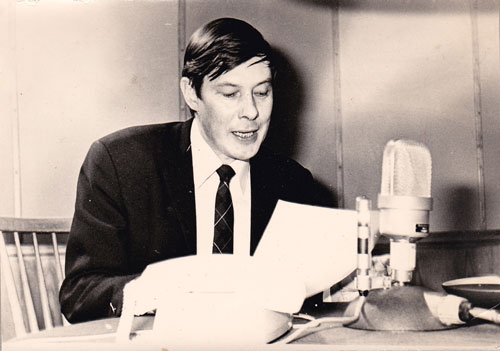 Radio-Moderator und -Sprecher bei Radio Bremen